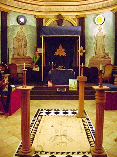 Temple maçonnique du Rite Écossais Rectifié à la ville de Perpignan